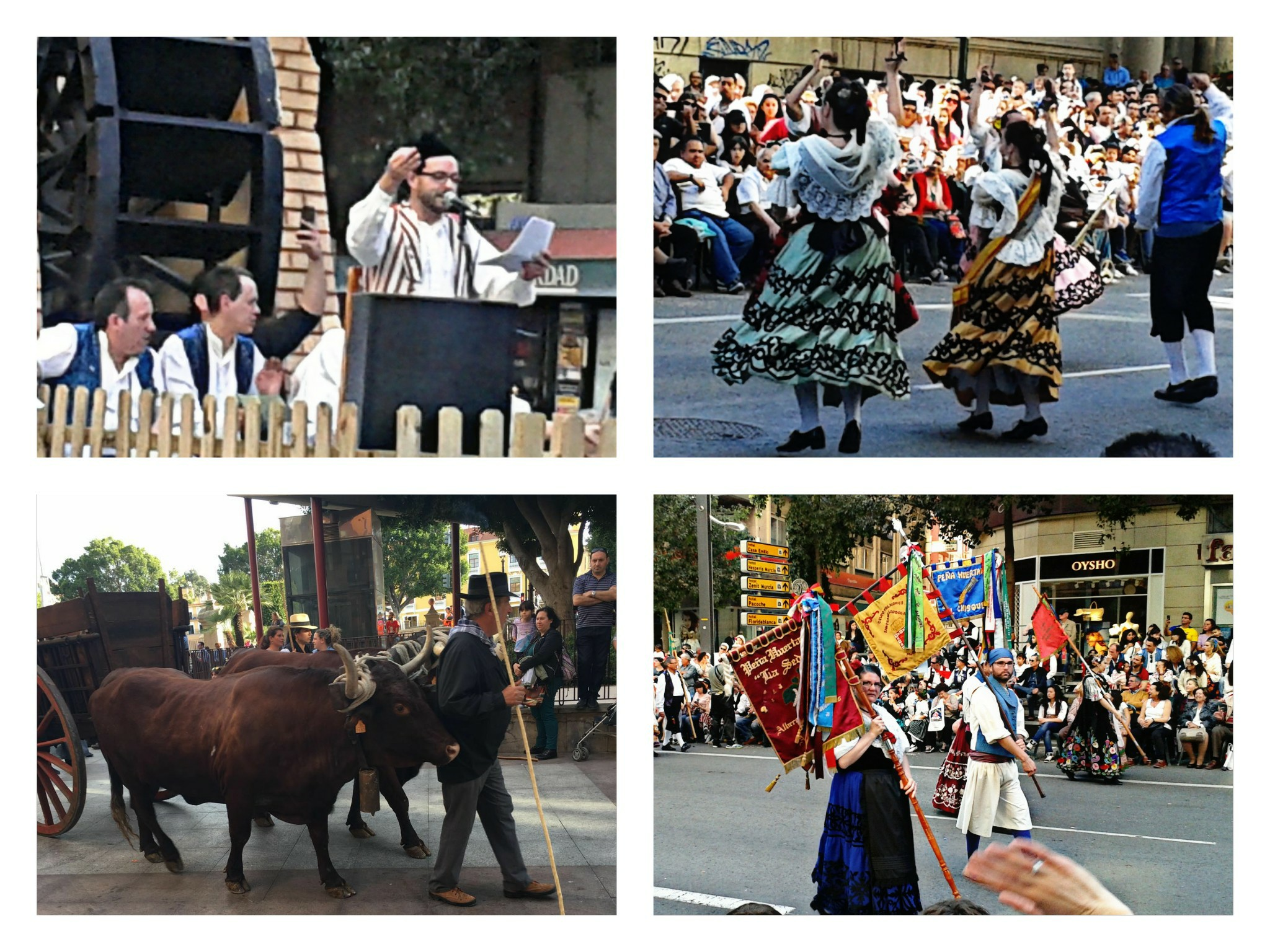 Bando de la Huerta (Murcia)